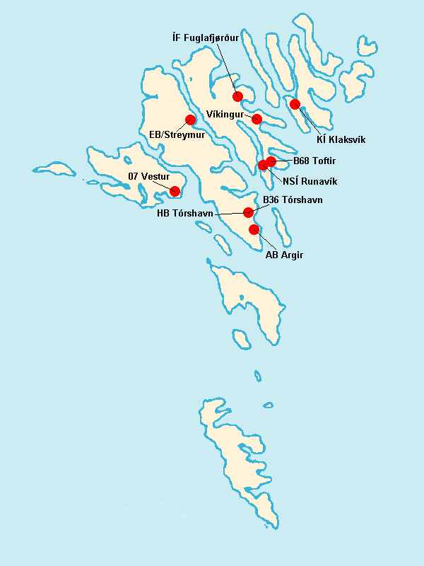 Répartition des clubs en Vodafonedeildin 2009.